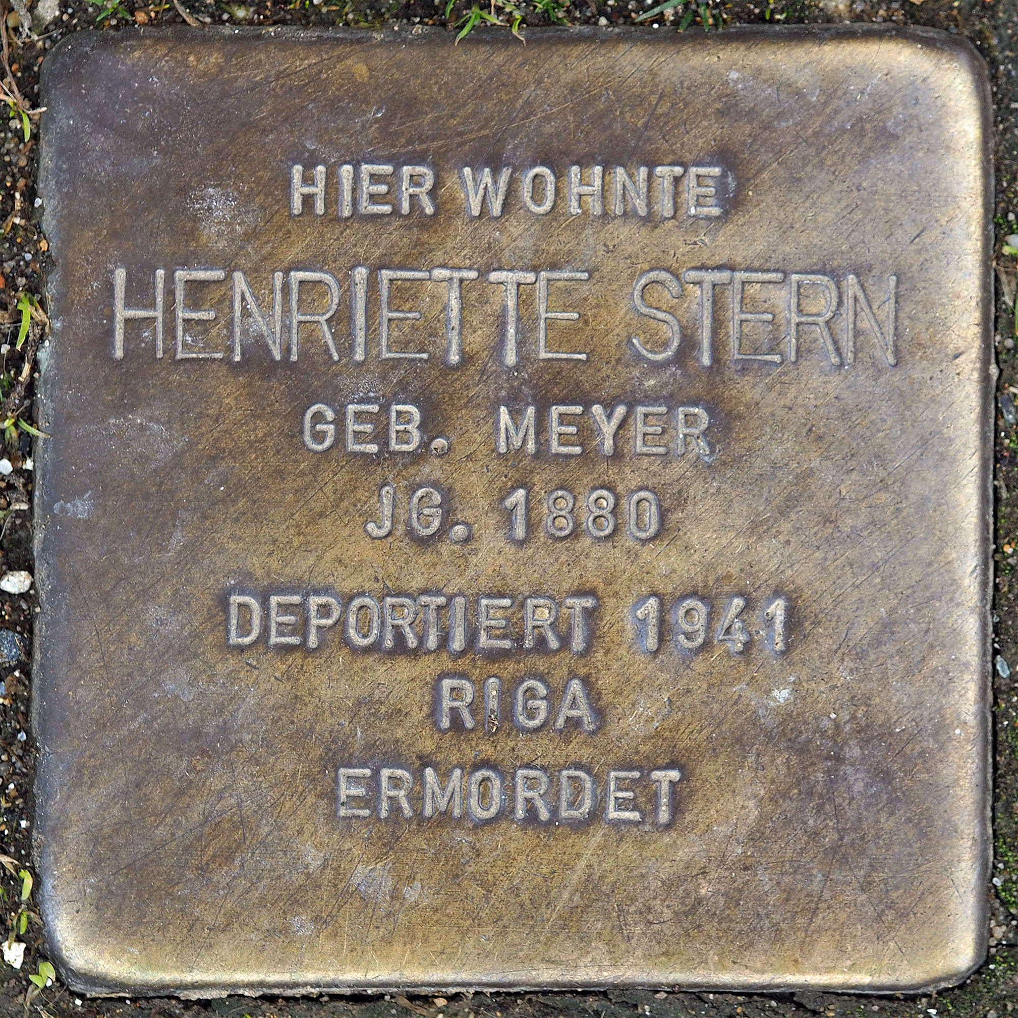 Stolpersteine MG: Stern, Henriette